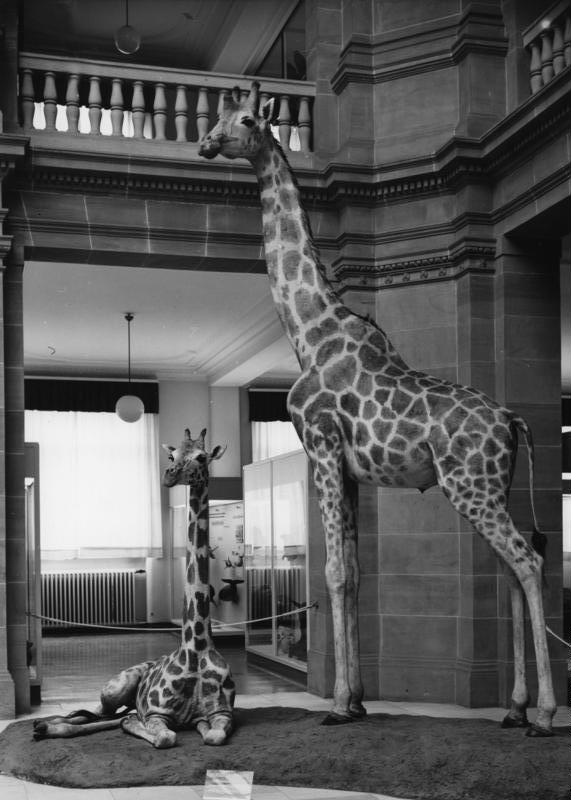 Zoologisches Museum Alexander König, Bonn Ein bemerkenswertes Schauobjekt im Museum König sind zwei aus dem Sudan stammende Kordofan-Giraffen. Diese Tiere können ein Scheitelhöhe vis zu 6 m und eine Schulterhöhe von 3 m erreichen.